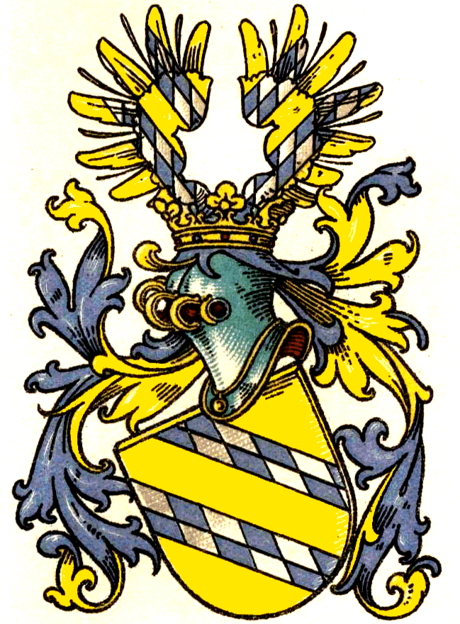 Wappen derer von Horhusen